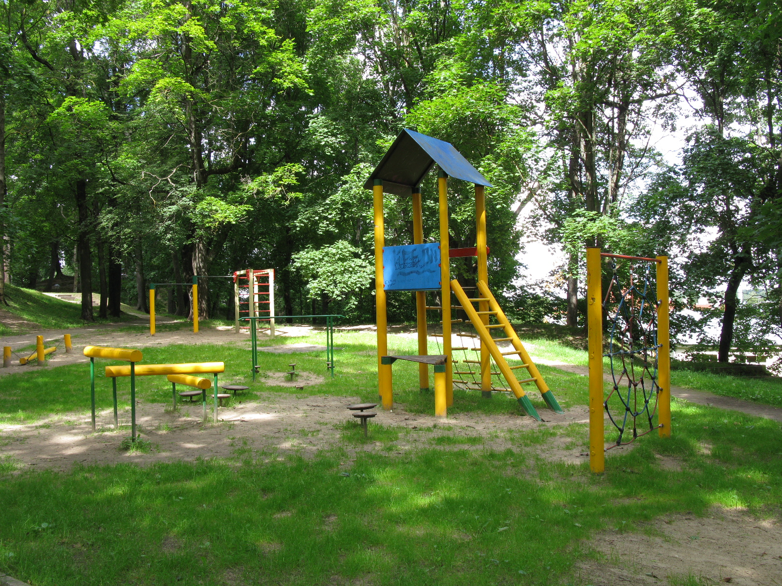 Mänguväljak Tartus Toomemäel, Vallikraavi tänava poolses küljes, 20. juuli 2012. Foto: Oop.